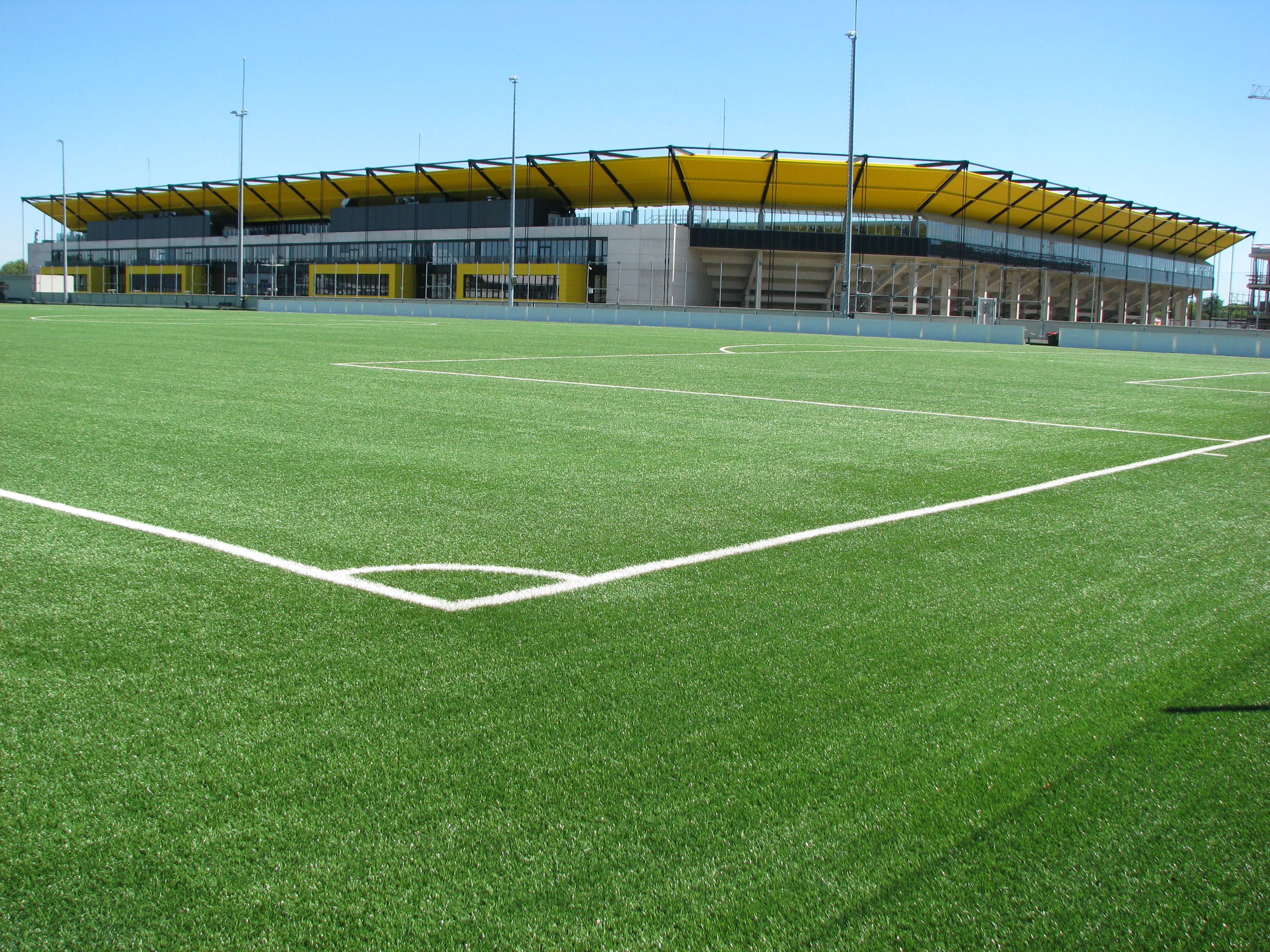 Traingsplatz mit Kunstrasen auf dem Parkhaus am neuen Tivoli in Aachen.